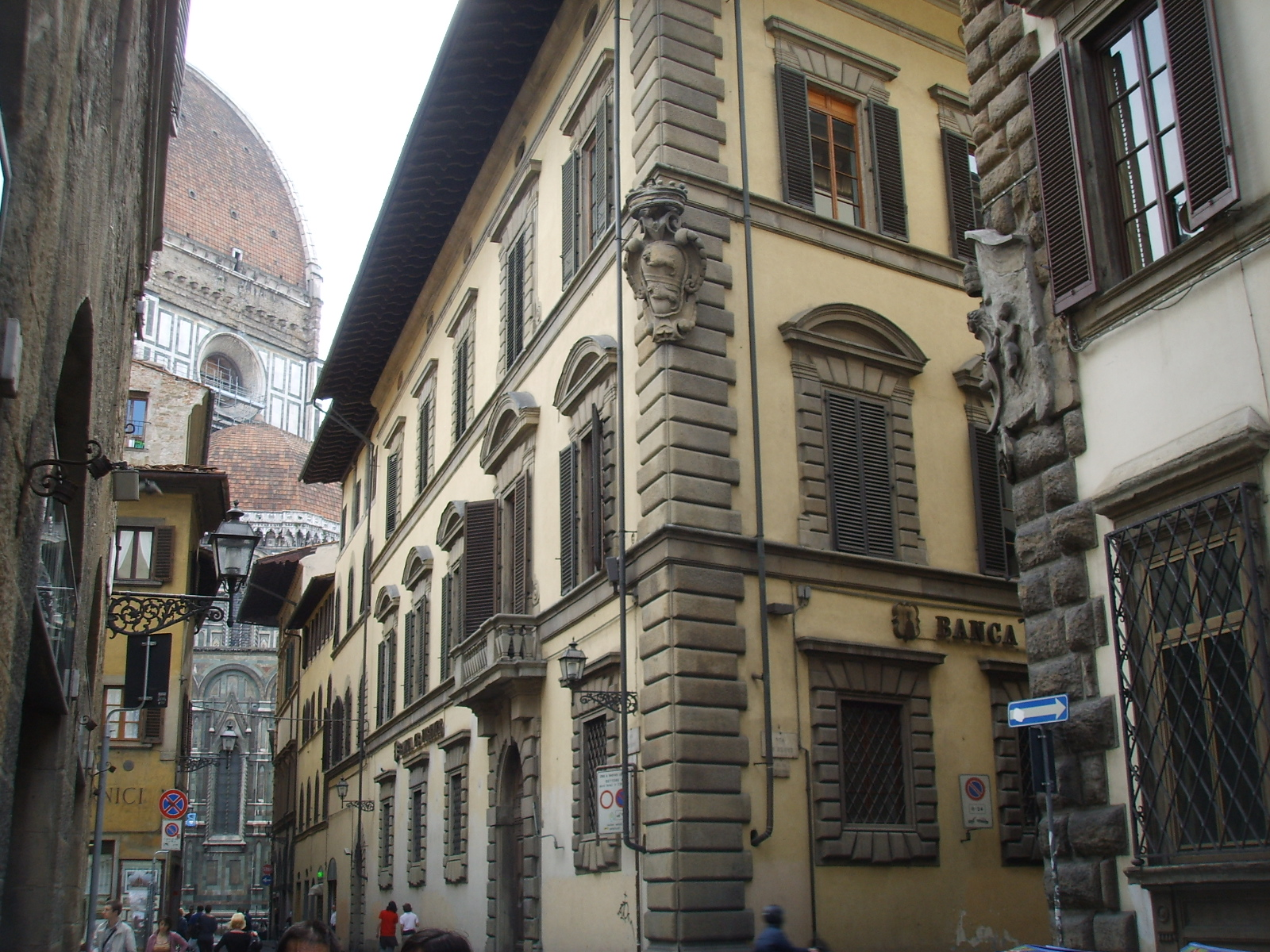 Palazzo_Incontri in Florence